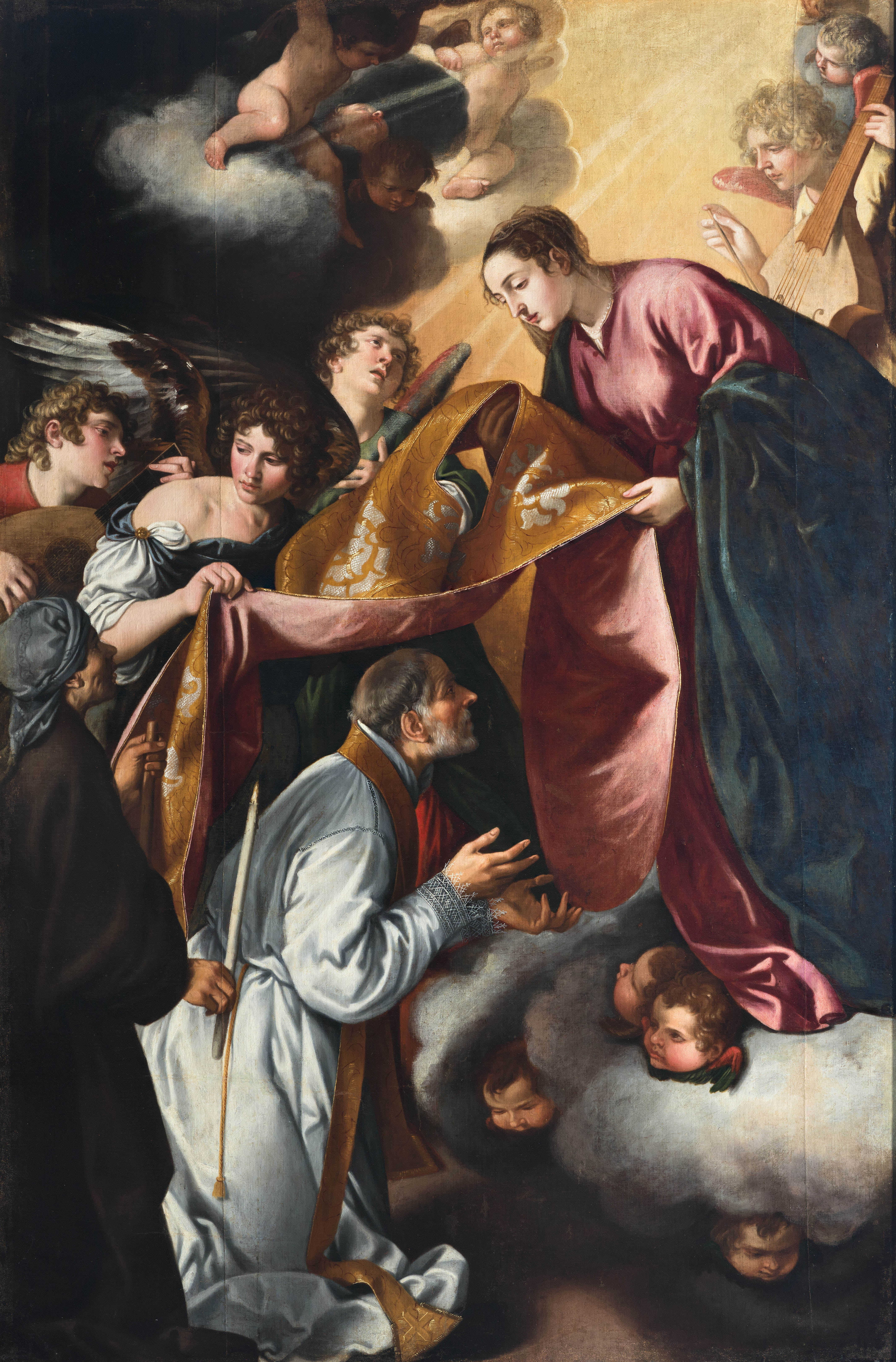 La imposición de la casilla de San Ildefonso por la Virgen María